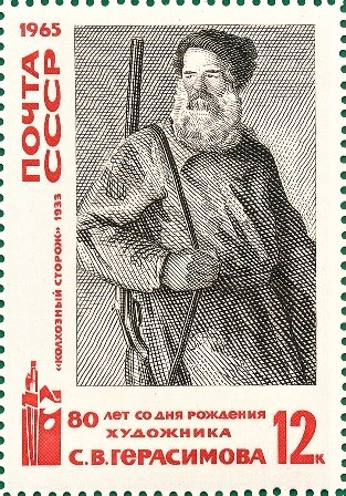 Почтовая марка СССР. 1965. Русское изобразительное искусство. Колхозный сторож (худ. С. В. Герасимов). Номер в каталоге ЦФА 3227